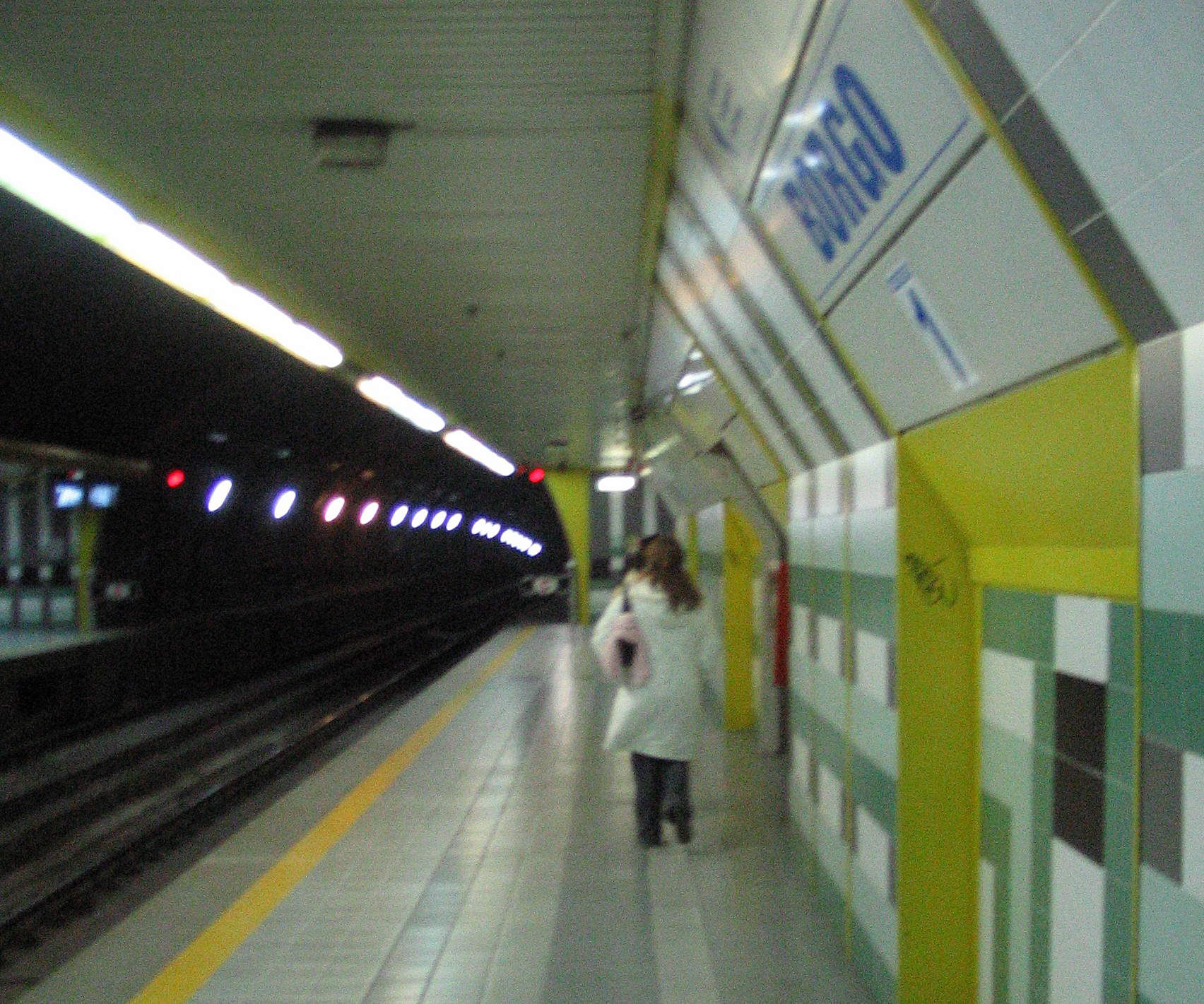 L'interno della stazione Borgo della Metropolitana di Catania